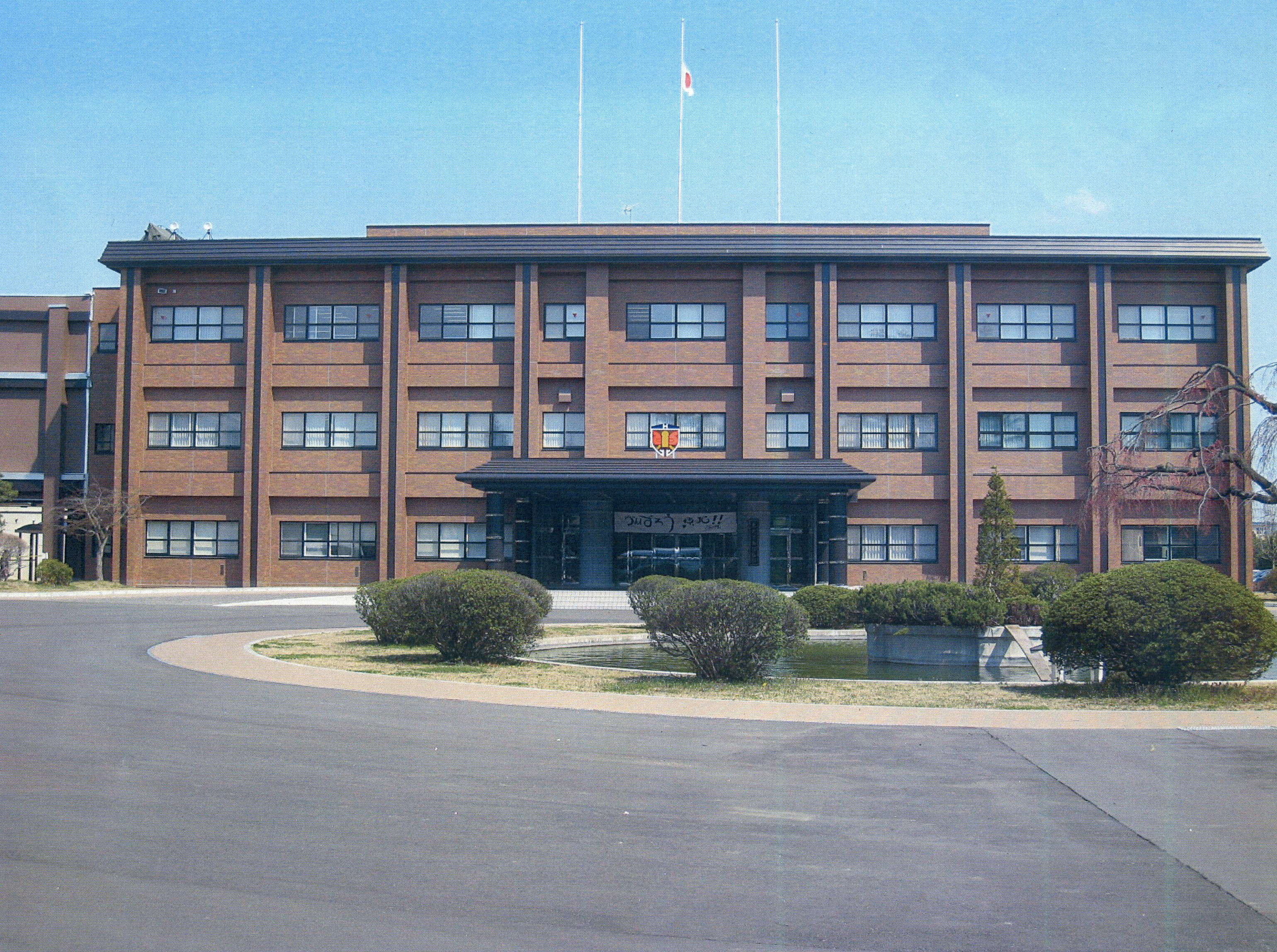 災統合任務部隊-東北（JTF-TH）司令部、東日本大震災での被害者に弔意を表すため半旗を掲揚している。